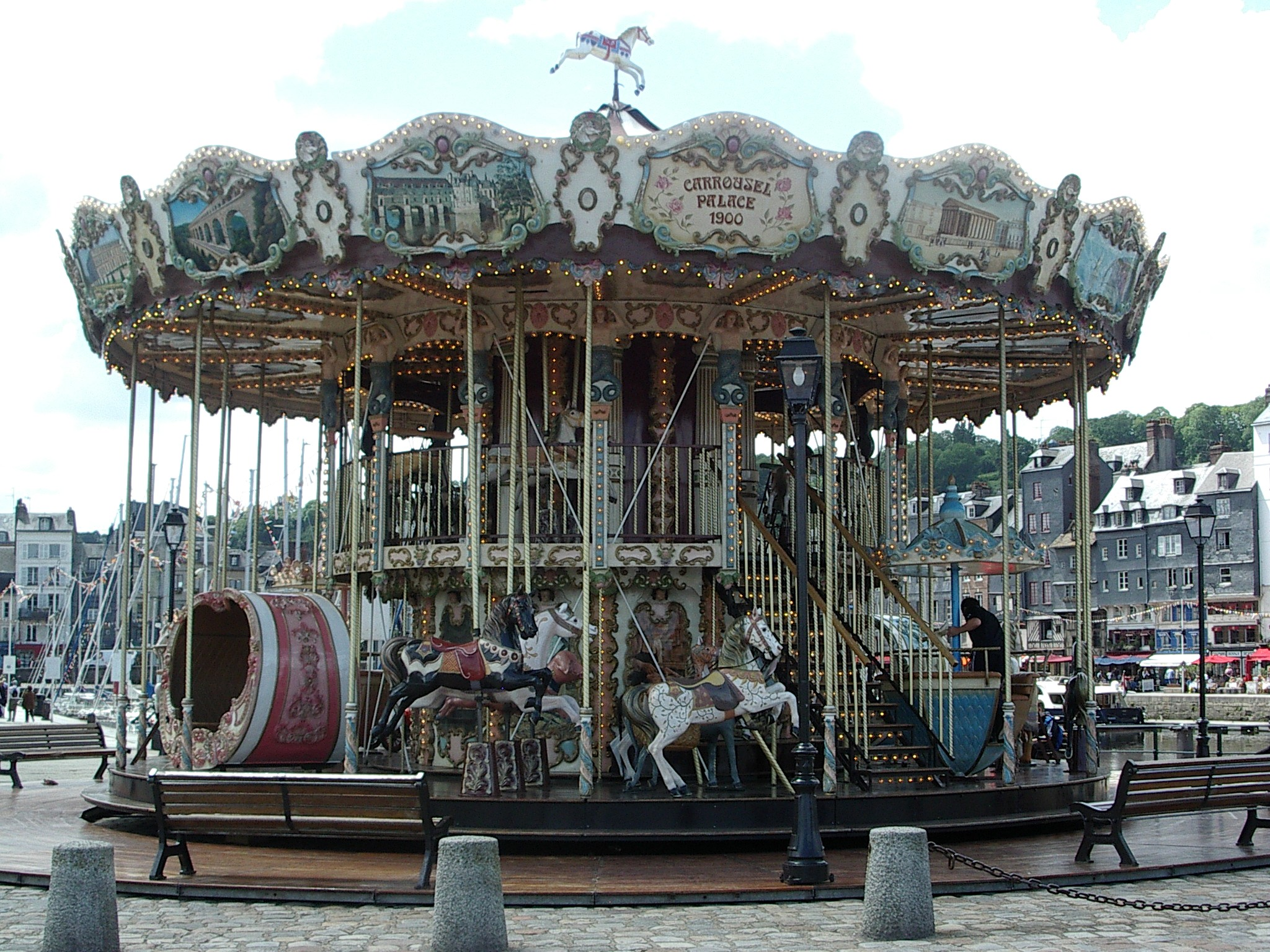 A carousel in Honfleur, France